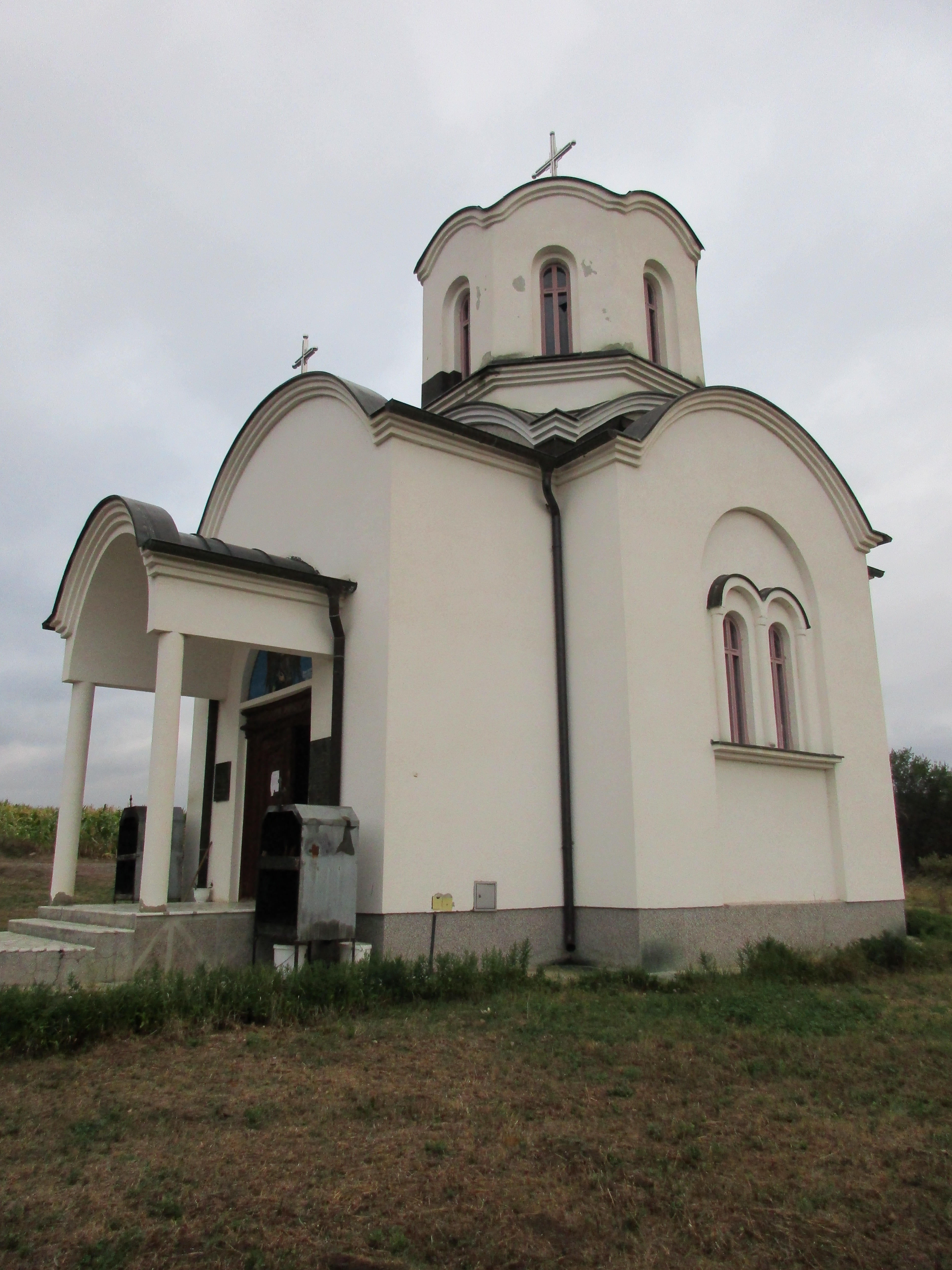 Srpski (latinica): Crkva Svetog Arhangela Gavira, Vrbovac